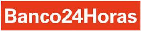 Banco24Horas logo